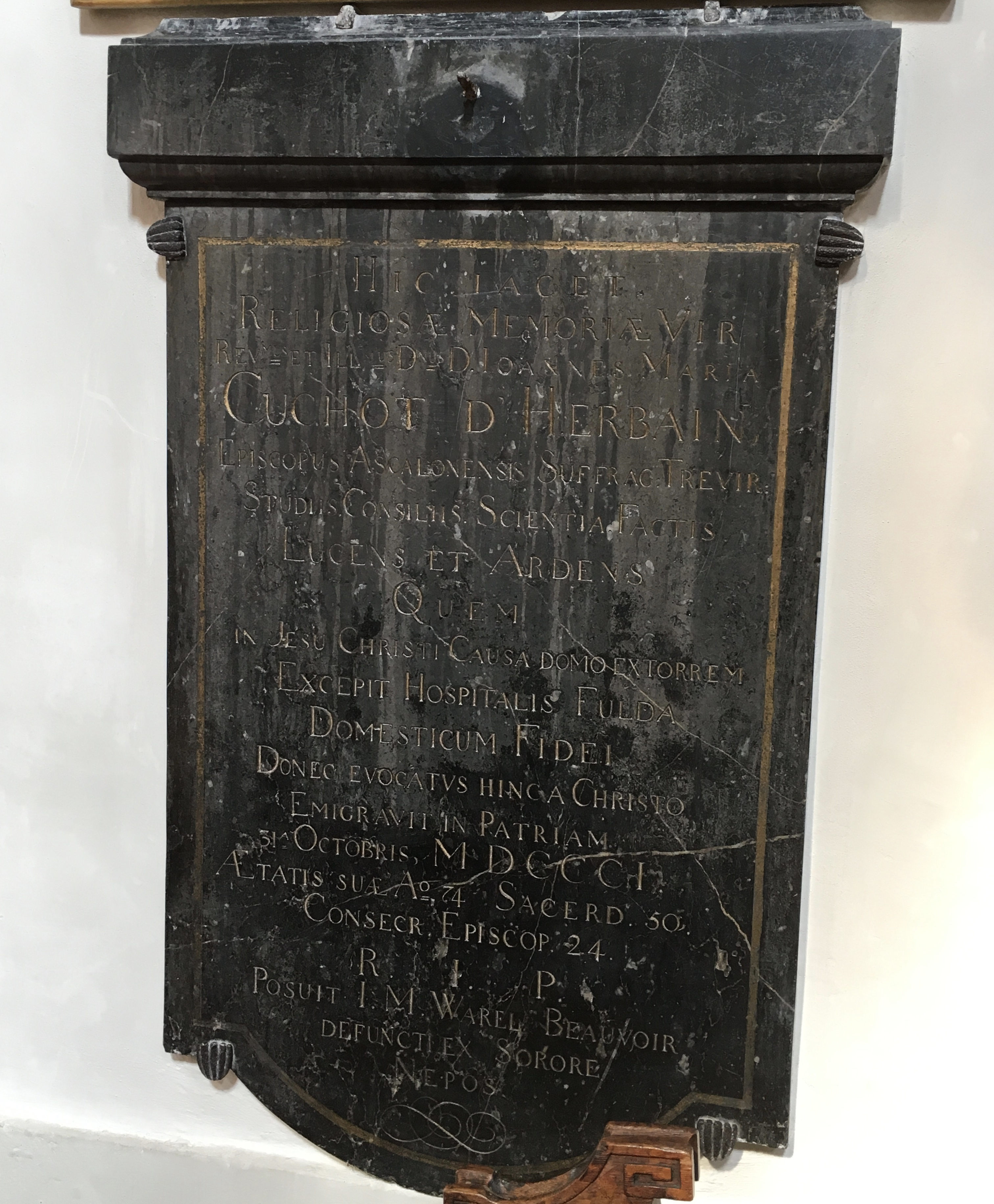 Graplatte im linken Seitenschiff